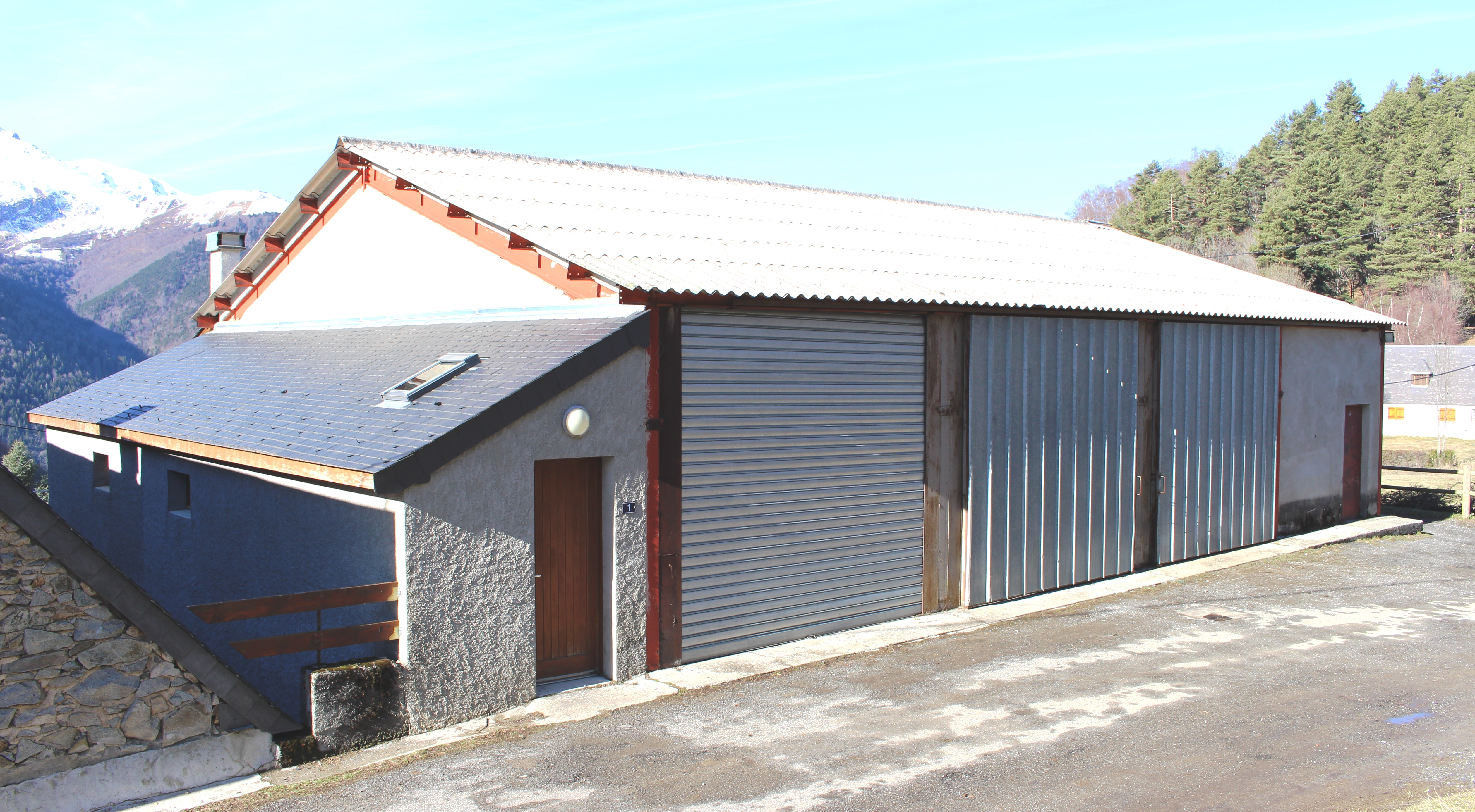 Salle des fêtes de Lançon (Hautes-Pyrénées)